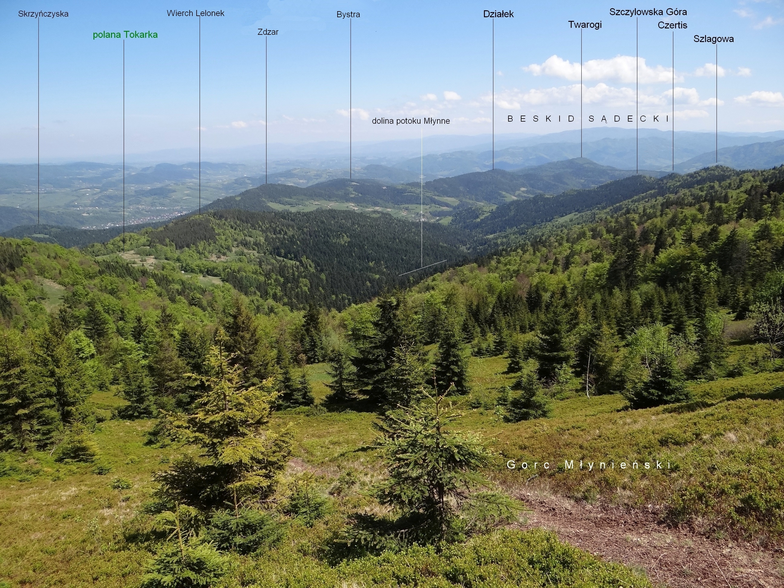 Widok z Gorca Młynieńskiego